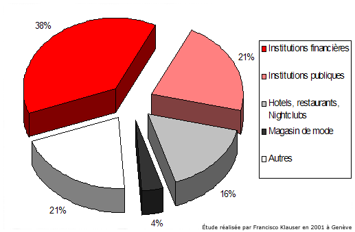 Graphique de l'utilisation de caméras en fonction des domaines en 2001 à Genève en Suisse.